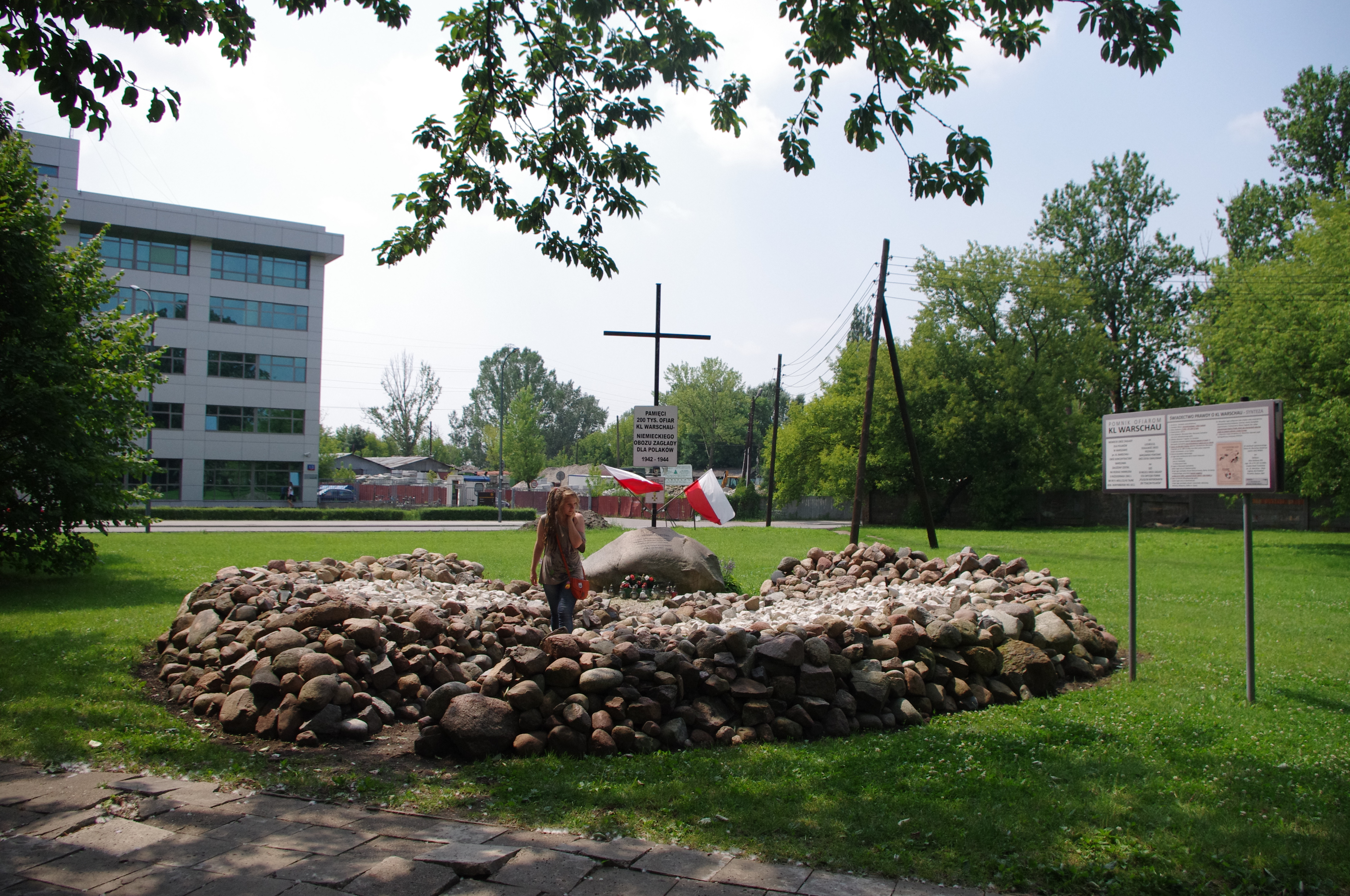 Pomnik ofiarom KL Warschau na Skwerze im. Alojzego Pawełka w Warszawie.